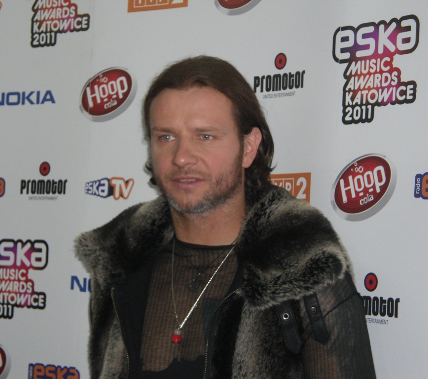 Zdjęcie zrobione podczas Eska Music Awards 2011 w katowickim Spodku.